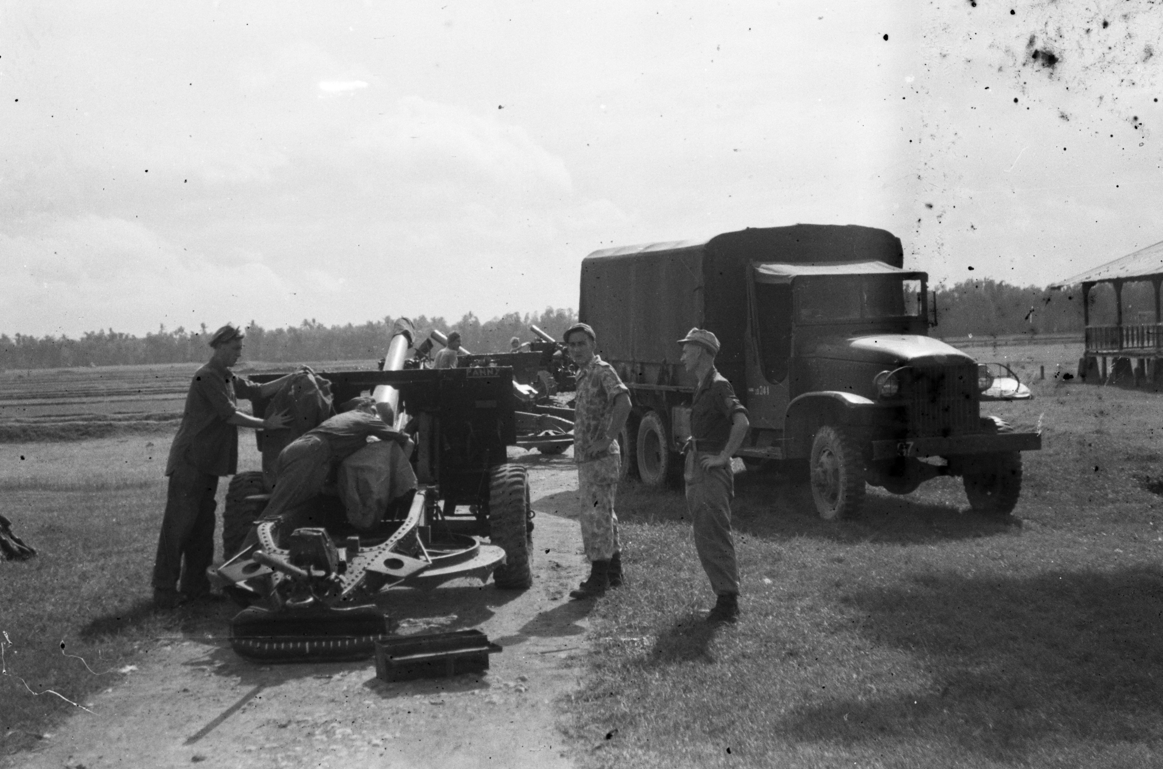 Collectie / Archief : Fotocollectie Dienst voor Legercontacten Indonesië Reportage / Serie : [ onbekend ] Beschrijving : Artillerie. Een batterij 25-ponders wordt in stelling gebracht Datum : december 1948 Locatie : Indonesië, Nederlands-Indië Fotograaf : Fotograaf Onbekend / DLC Auteursrechthebbende : Nationaal Archief Materiaalsoort : Negatief (zwart/wit) Nummer archiefinventaris : bekijk toegang 2.24.04.02 Bestanddeelnummer : 2995